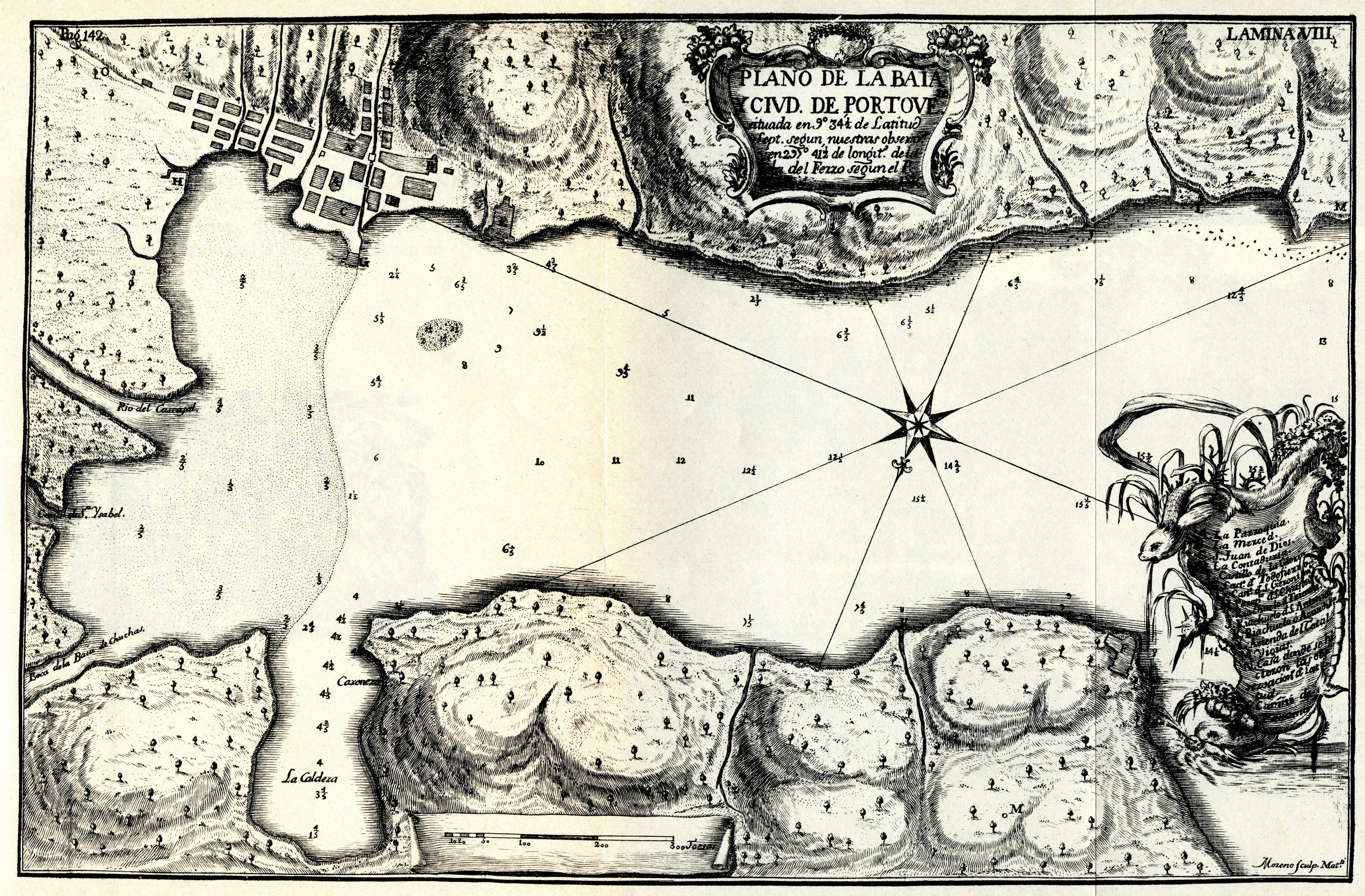 De Ulloa, Antonio y Jorge Juan. Relación Histórica del Viaje a la América Meridional, hecho de Orden de Su Majestad Católica para medir algunos Grados de Meridiano Terrestre, y venir por ellos en conocimiento de la verdadera Figura y Magnitud de la Tierra, con otras varias Observaciones Astronómicas y Físicas. Por Don Jorge Juan Comendador de Aliaga, en la Orden de San Juan, Socio correspondiente de la Real Academia de las Ciencias de París; y Don Antonio de Ulloa de la Real Sociedad de Londres: ambos por Capitanes de Fragata de la Real Armada. Primera Parte / Tomo I. Impresa por la Orden del Rey Nuestro Señor en Madrid por Antonio Marín, Año de MCDDXLVIII (1748). Diapositiva de Consulta y acceso publico cuya información fue investigada de un libro y/o ejemplar de revisión custodiado en los Fondos Bibliográficos (Sección Siglo XVIII o Etapa Colonial) del Archivo Histórico del Guayas; Guayaquil, Ecuador